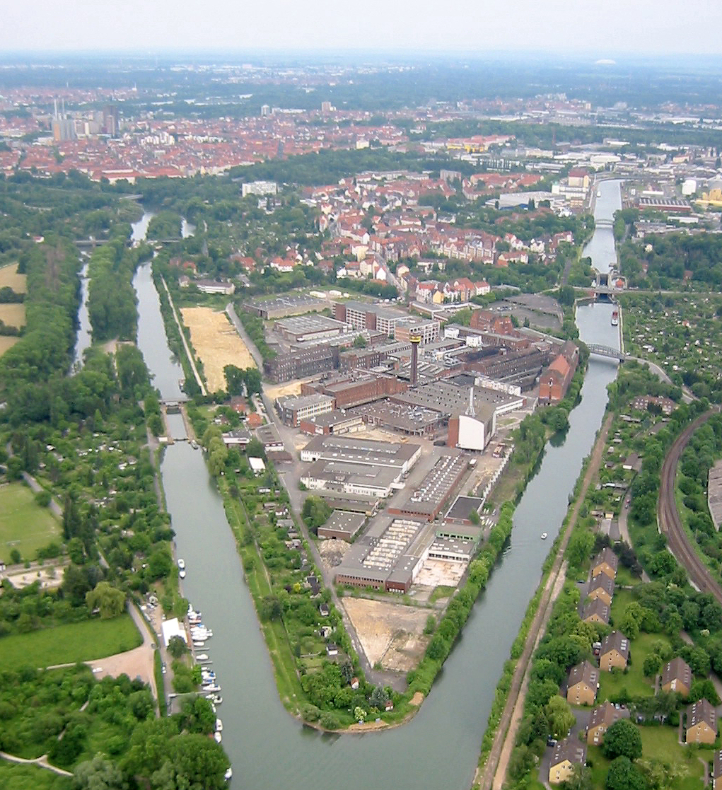 Altes Contiwerk in Hannover Ortsteil Limmer